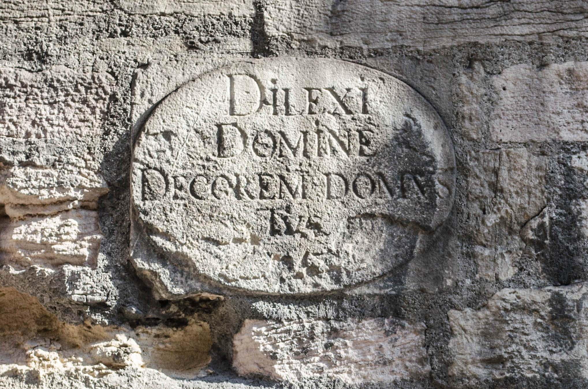 Dijon (Côte d’Or, France), église Saint-Philibert, façade Sud : médaillon portant l’inscription DILEXI DOMINE DECOREM DOMUS TUAE (Seigneur, j’ai aimé le séjour de ta maison), première partie du verset 8 du Psaume 26 de David